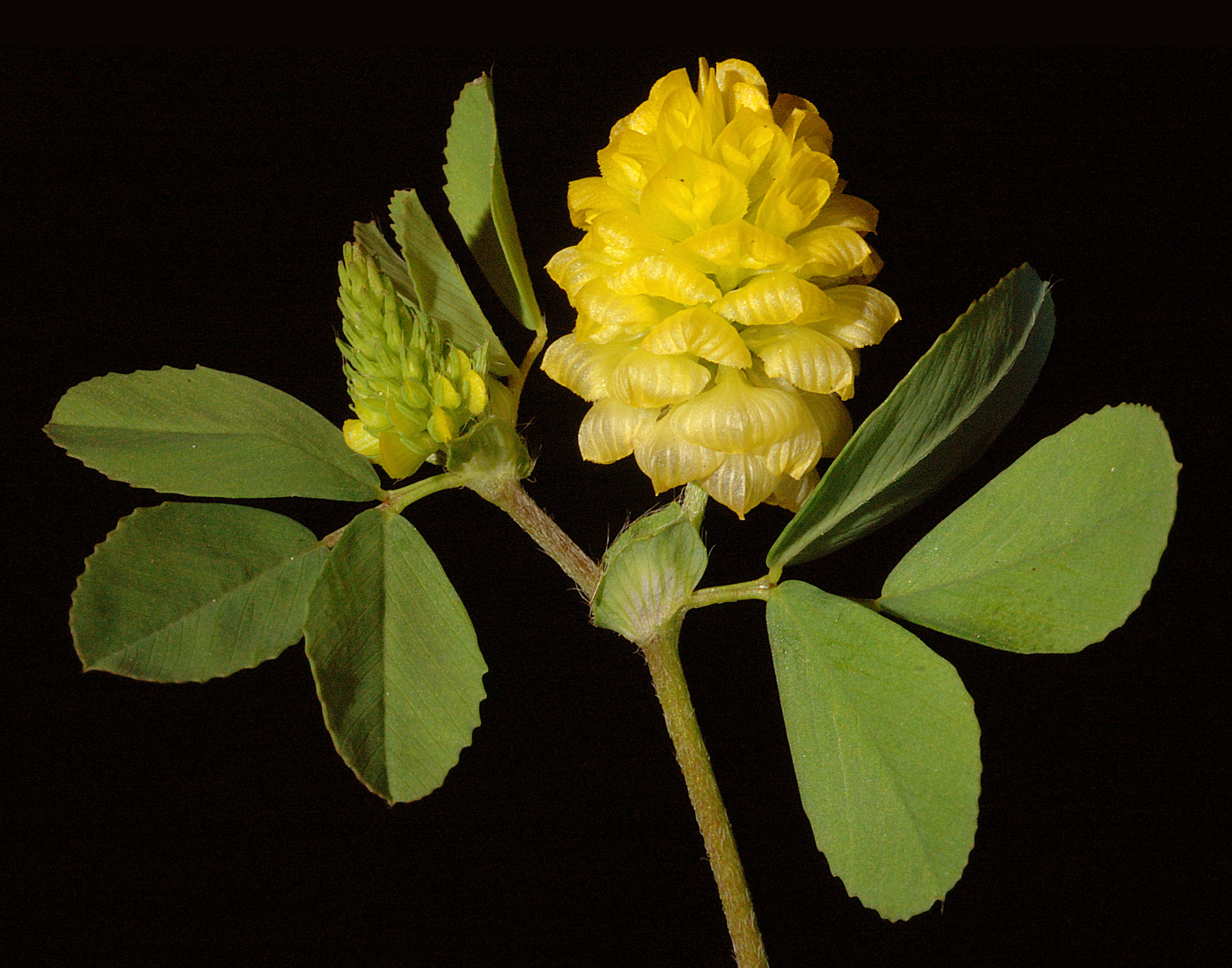 KRT3082